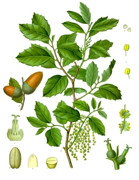 Korkeiche. A blühender Zweig, mit männlicher und weiblicher Blüthe, nat. Grösse; B Fruchtzweig desgl.; 1 Theil des männlichen Blüthenstandes, vergrössert; 2 Staubgefässe, desgl.; 3 Pollen, desgl.; 4 weiblicher Blüthenstand, desgl.; 5 weibliche Blüthe im Längsschnitt; 6 Same ohne Samenschale, desgl.; 7 und 8 derselbe im Quer- und Längsschnitt, desgl.